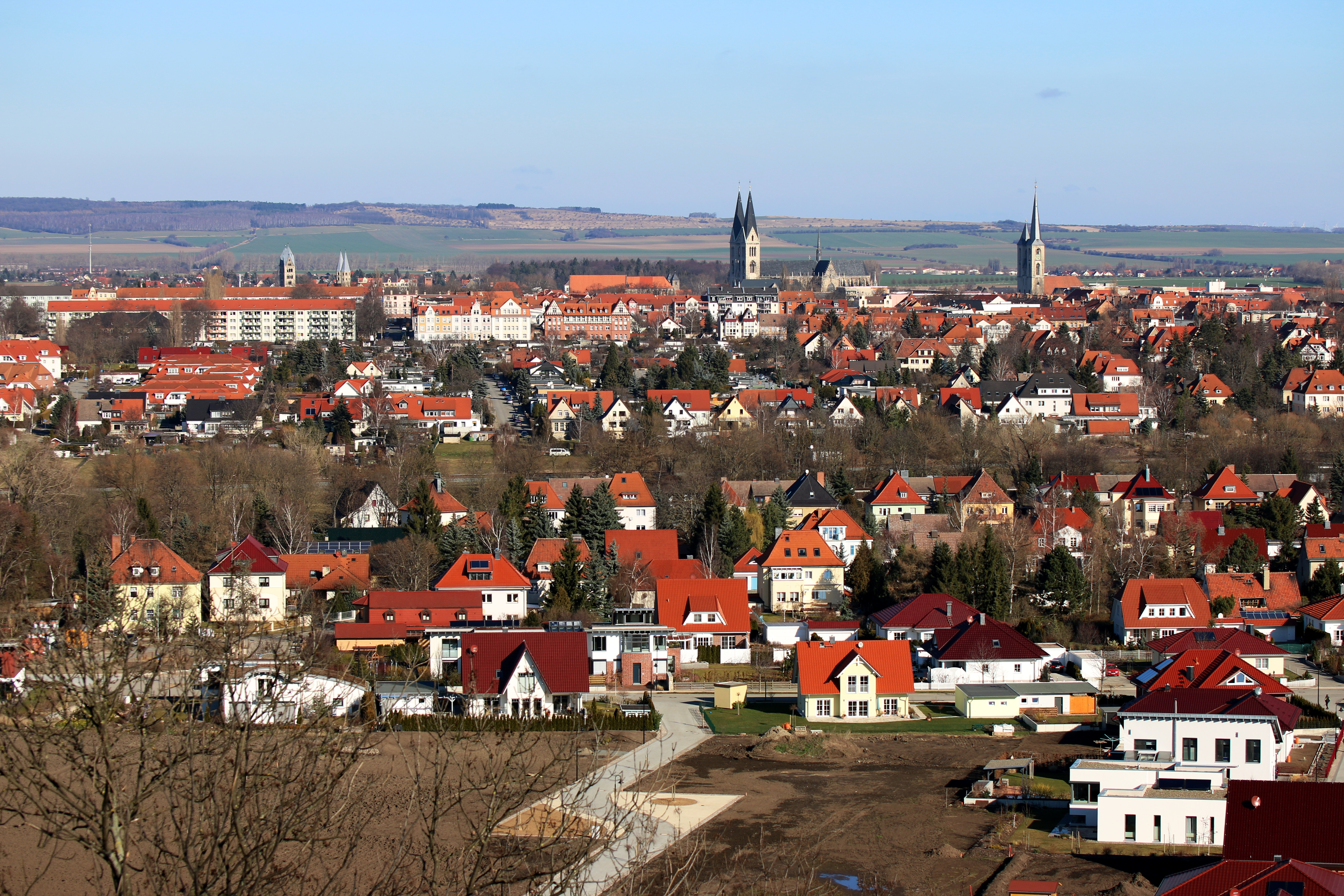 Halberstadt, Ansicht von Süden (von den Spiegelsbergen)